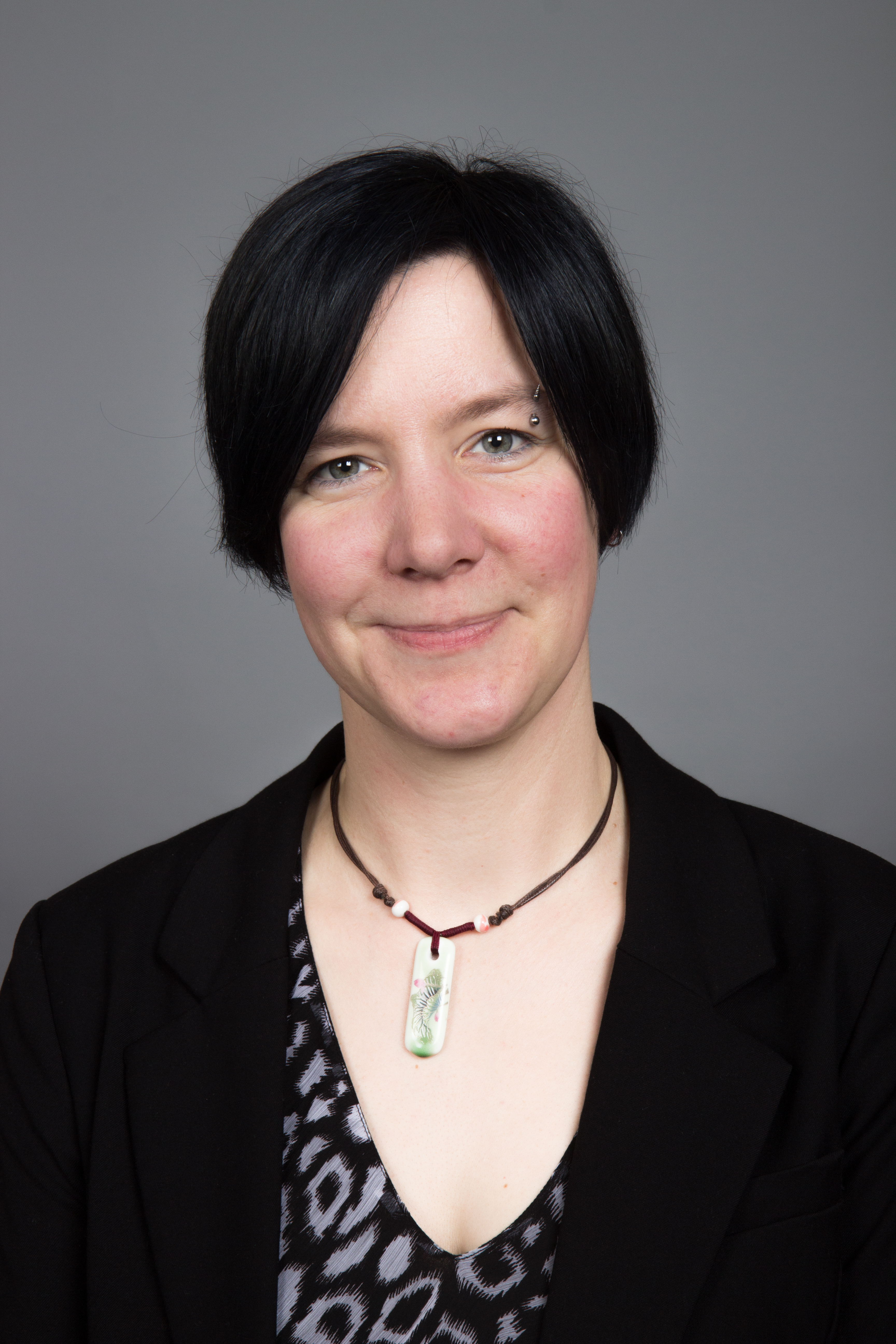 Nicole Müller-Orth, Abgeordnete des Landtags von Rheinland-Pfalz